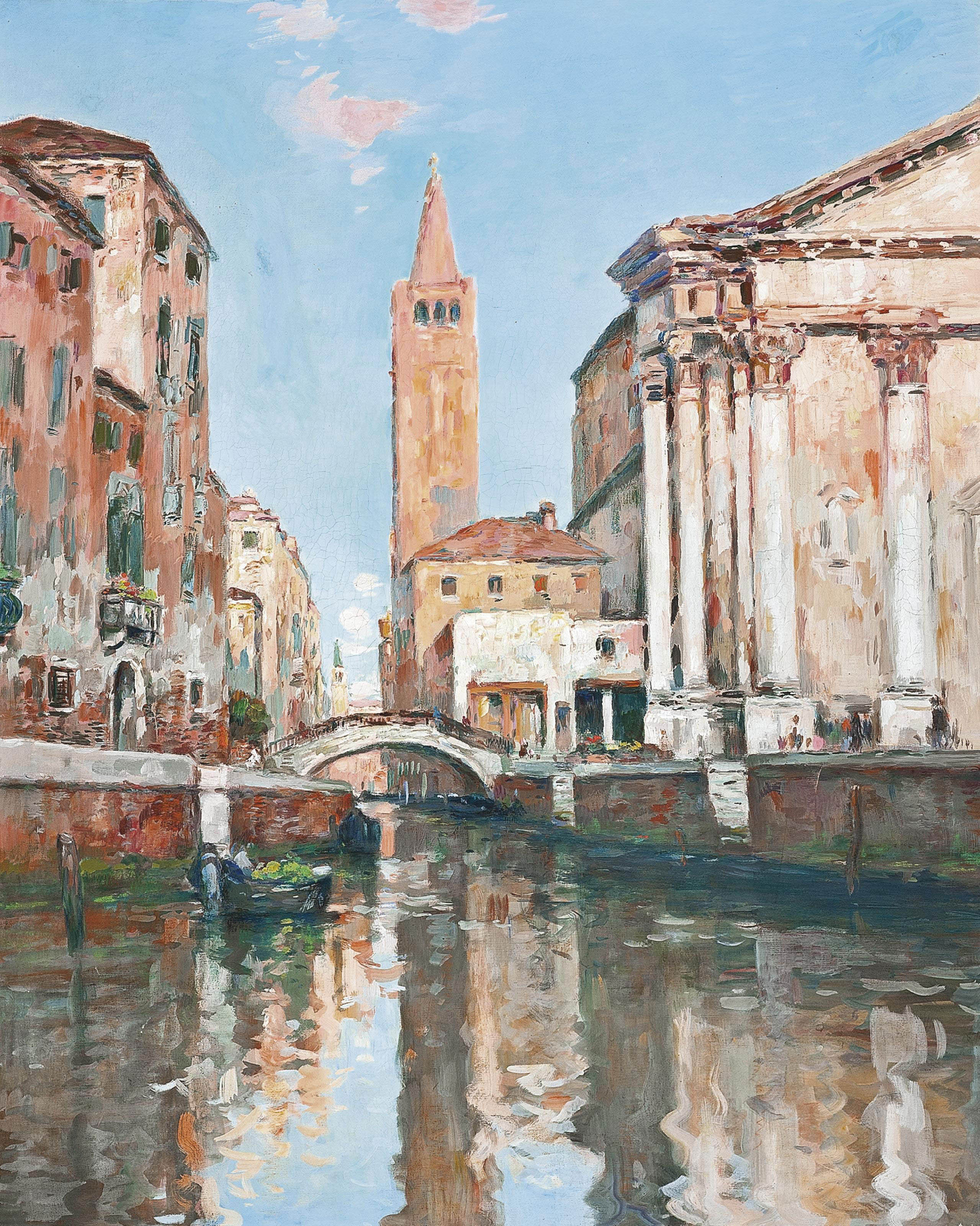 Vue de Venise